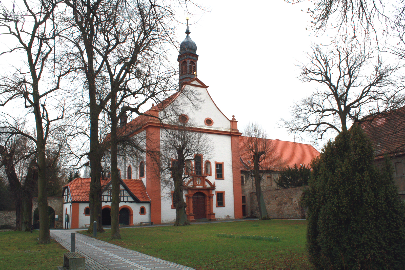 Worbis - Antoniuskirche auch Klosterkirche genannt